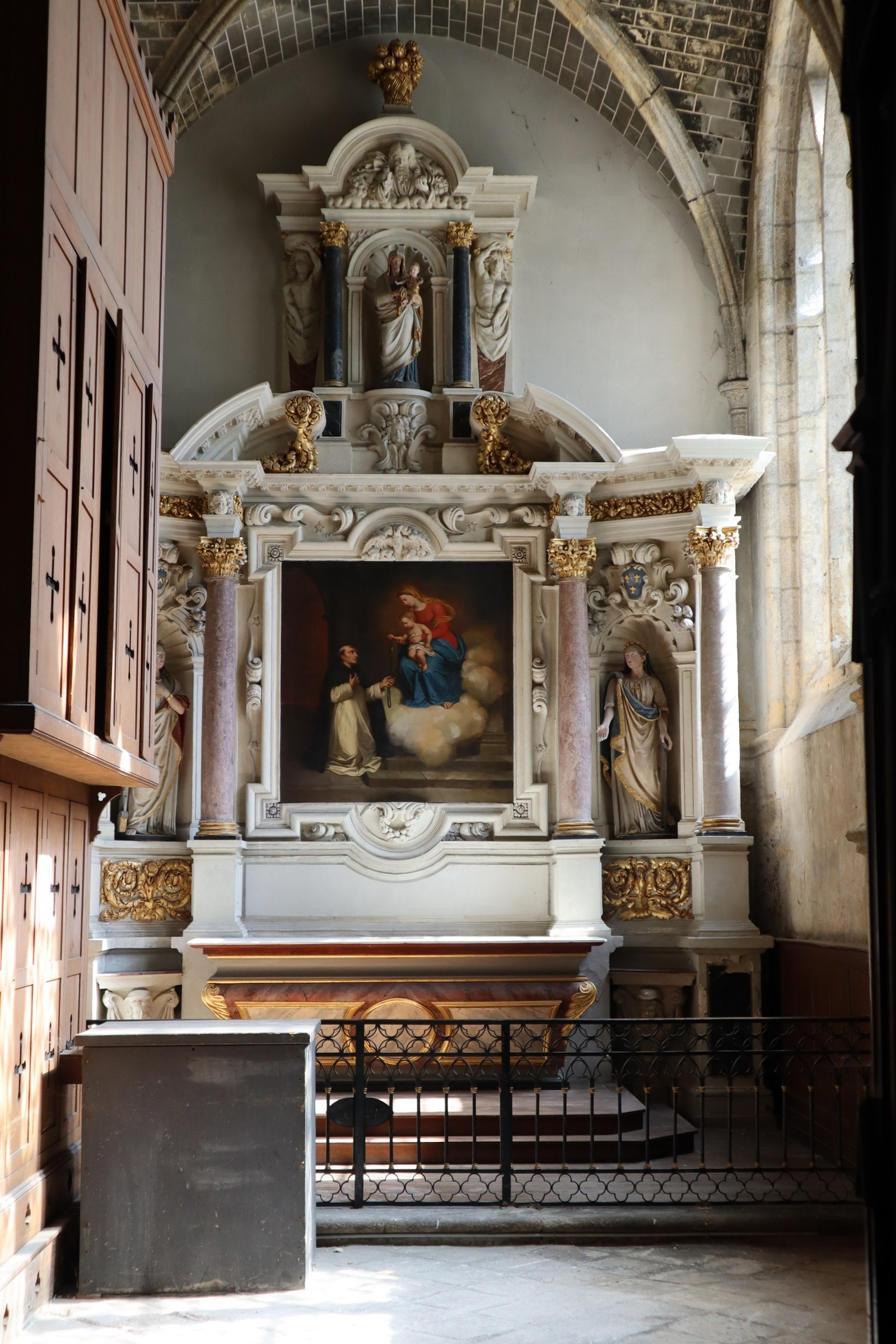 Autel et retable du Rosaire de l'abbatiale Saint-Sauveur de Redon (35).